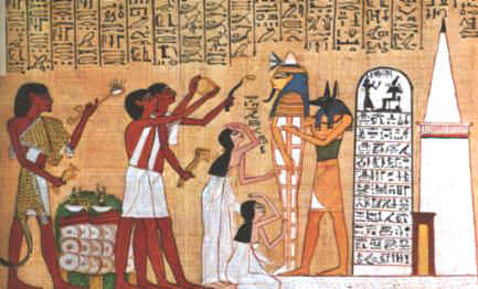 Mundöffnungsritual, Darstellung aus dem Papyrus Hunnefer, 19. Dynastie, um 1290 v. Better contrast version here: File:Opening of the mouth ceremony.jpg.